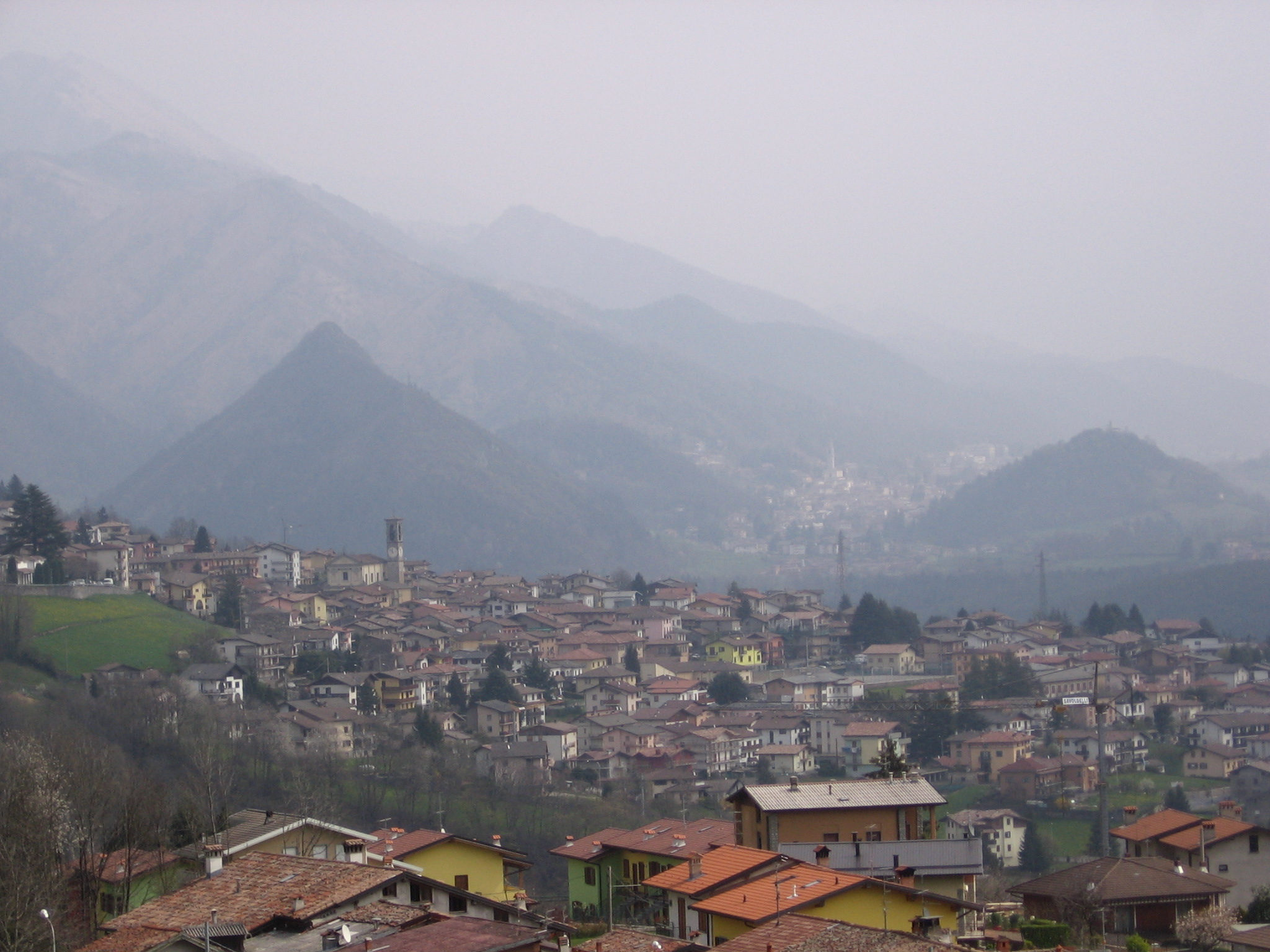 Parre, Bergamo, Italia